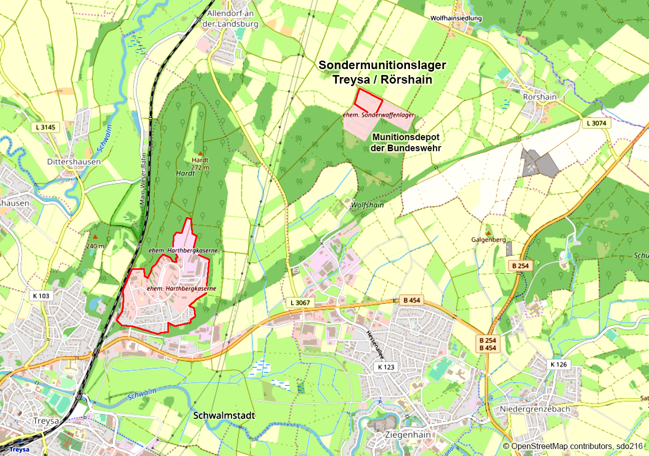 Lage des ehemaligen Sondermunitionslagers Treysa / Rörshain und der Harthbergkaserne bei Schwalmstadt, Hessen This map may be incomplete, and may contain errors. Don't rely solely on it for navigation.